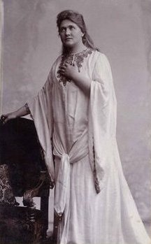 Cs. Alszeghy Irma (1865-1945) ismeretlen szerepben.